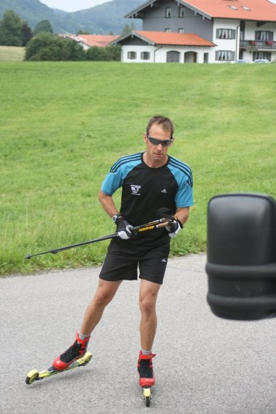 See Title